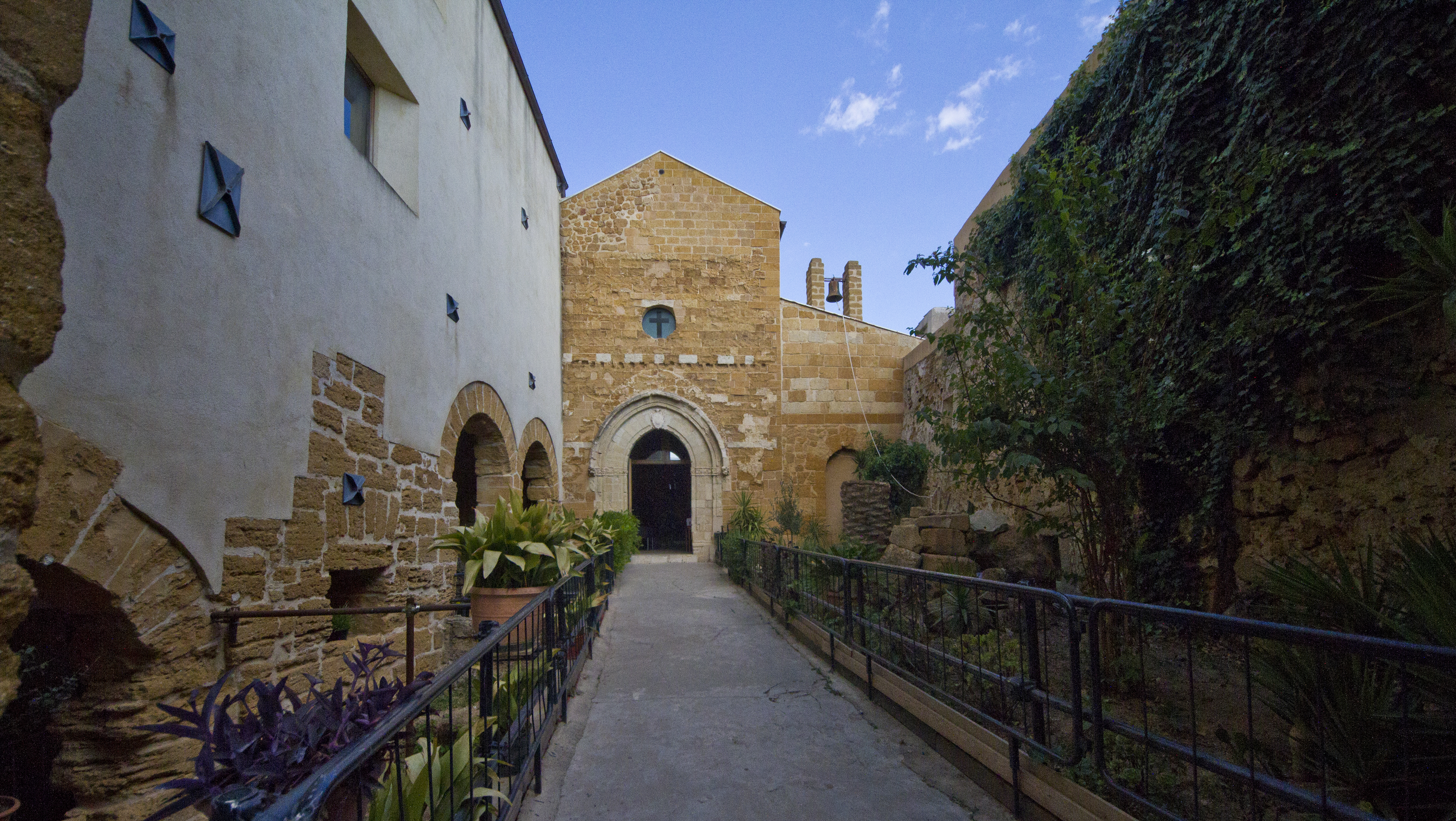 92100 Agrigento AG, Italy